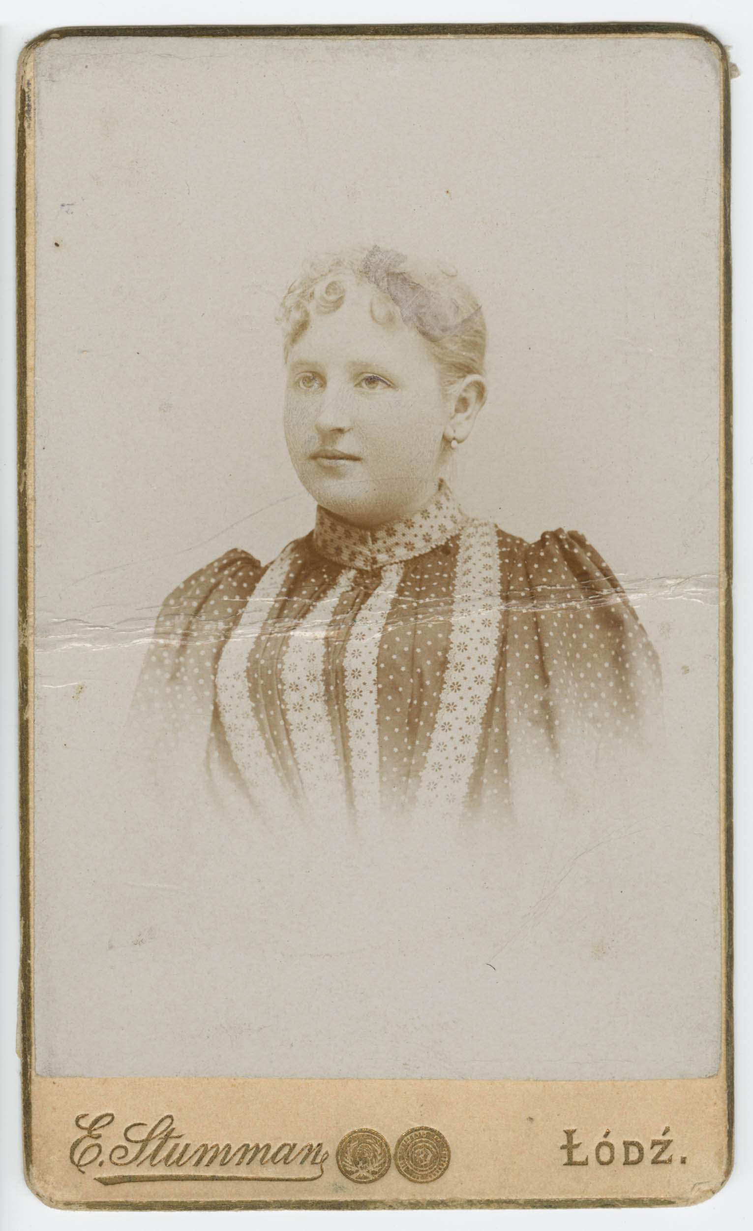 Fotografia portretowa wykonana w atelier zakładu fotograficznego "E. Stumman" przedstawia młodą dziewczynę w stroju wizytowym z gładko zaczesanymi włosami. Zdjęcie zostało wykonane na jasnym tle. Zakład fotograficzny “E. Stumman” funkcjonował już w 1856 roku prawdopodobnie w Warszawie. W Łodzi działalność podjął w 1871 roku. Do 1887 roku zakład mieścił się przy ulicy Piotrkowskiej 24. Następnie, gdy w 1887 roku Antoni Jezierski postanowił wybudować murowaną piętrową oficynę mieszkalną z pomieszczeniem dla zakładu fotograficznego, na posesji pod adresem Piotrkowska 20, Eliasz Stumman skorzystał z nadarzającej się możliwości i przeniósł tam swój zakład. Kolejna zmiana adresu nastąpiła na początku XX wieku, kiedy to w centralnej części podwórka przy Piotrkowskiej 17, wystawiono jednopiętrowy budynek, z przeznaczeniem na zakład fotograficzny. Nowe atelier nie służyło Eliaszowi Stummanowi, który zmarł w 1903 r. Obecnie po dawnym atelier pozostały jedynie fundamenty, tworzące dzisiaj obrys budynku, dobrze widoczny z lotu ptaka. Eliasz Stumman fotografował łódzkie pałace, budynki fabryczne czy park Helenowski. Z jego zdjęć powstał album „Łódź-Lodz” wydany w Dreźnie w 1888 roku.